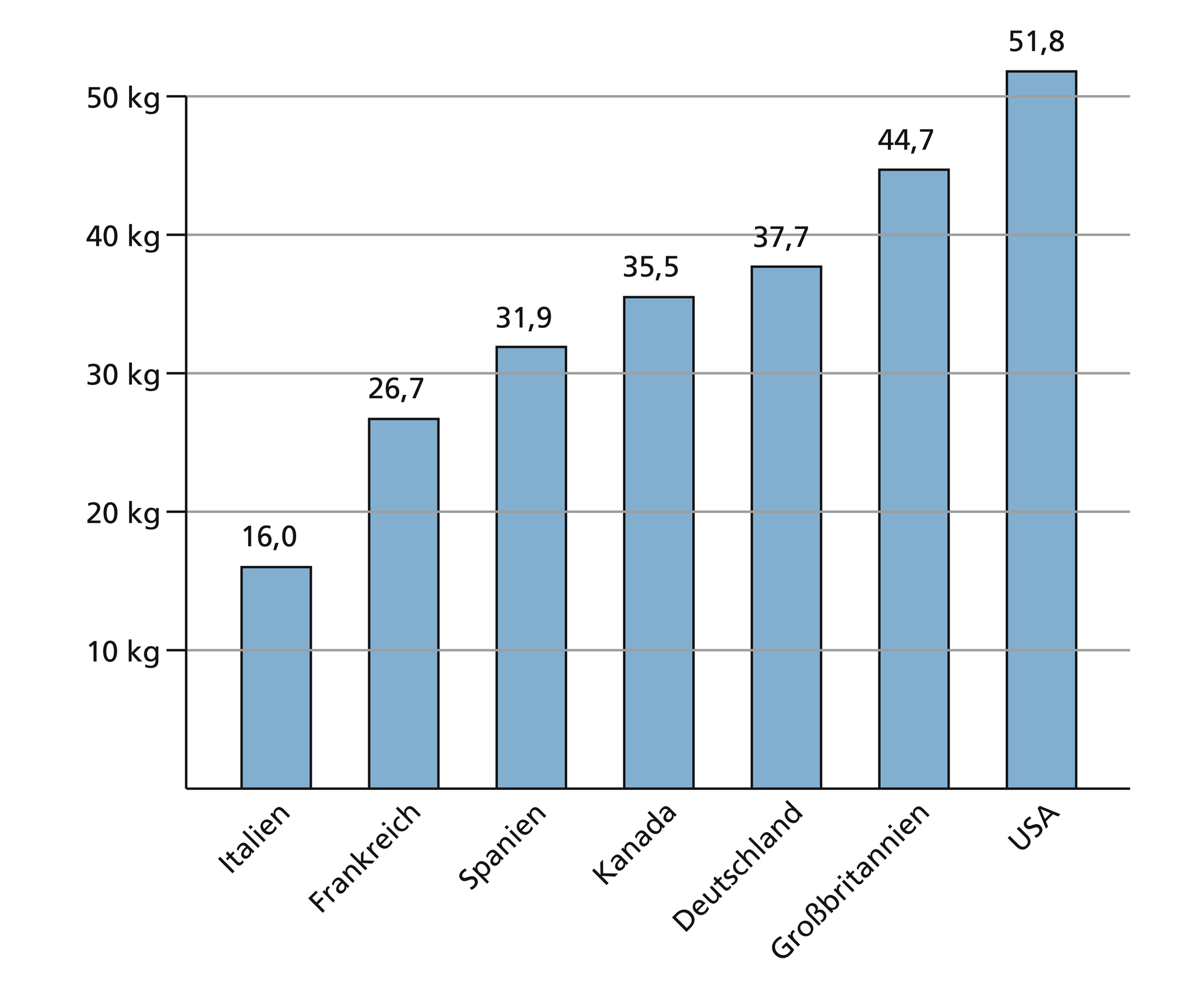 Der Pro-Kopf-Verbrauch von tiefgekühlten Lebensmitteln in verschiedenen Ländern 2006 (in Kilogramm, ohne Speiseeis). Quelle: Deutsches Tiefkühlinstitut e. V.